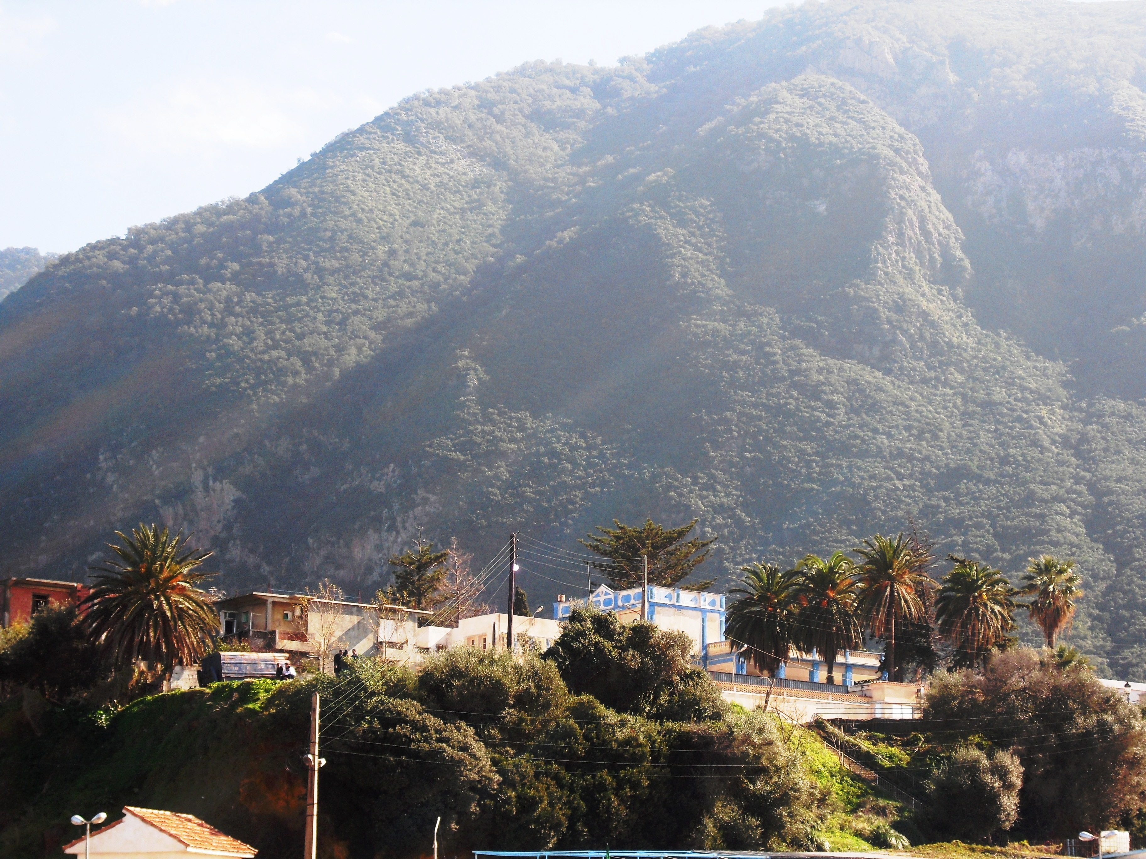 vue sur le village de mansouria à la commune de ziama mansouria (Jijel - Algérie) photo prise par mon appareil en avril 2011